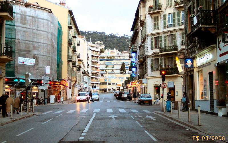 Nice-Le boulevard Carnot en direction de Villefranche. Derrière, le port de Nice. Photo prise au crépuscule.